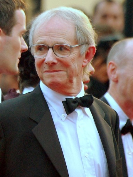 Ken Loach at the Cannes film festival.